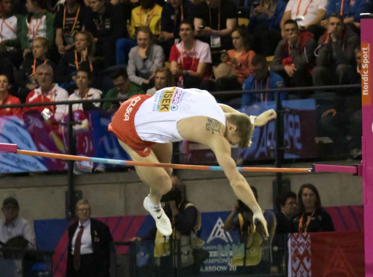 EKI20407 polsstok lisek